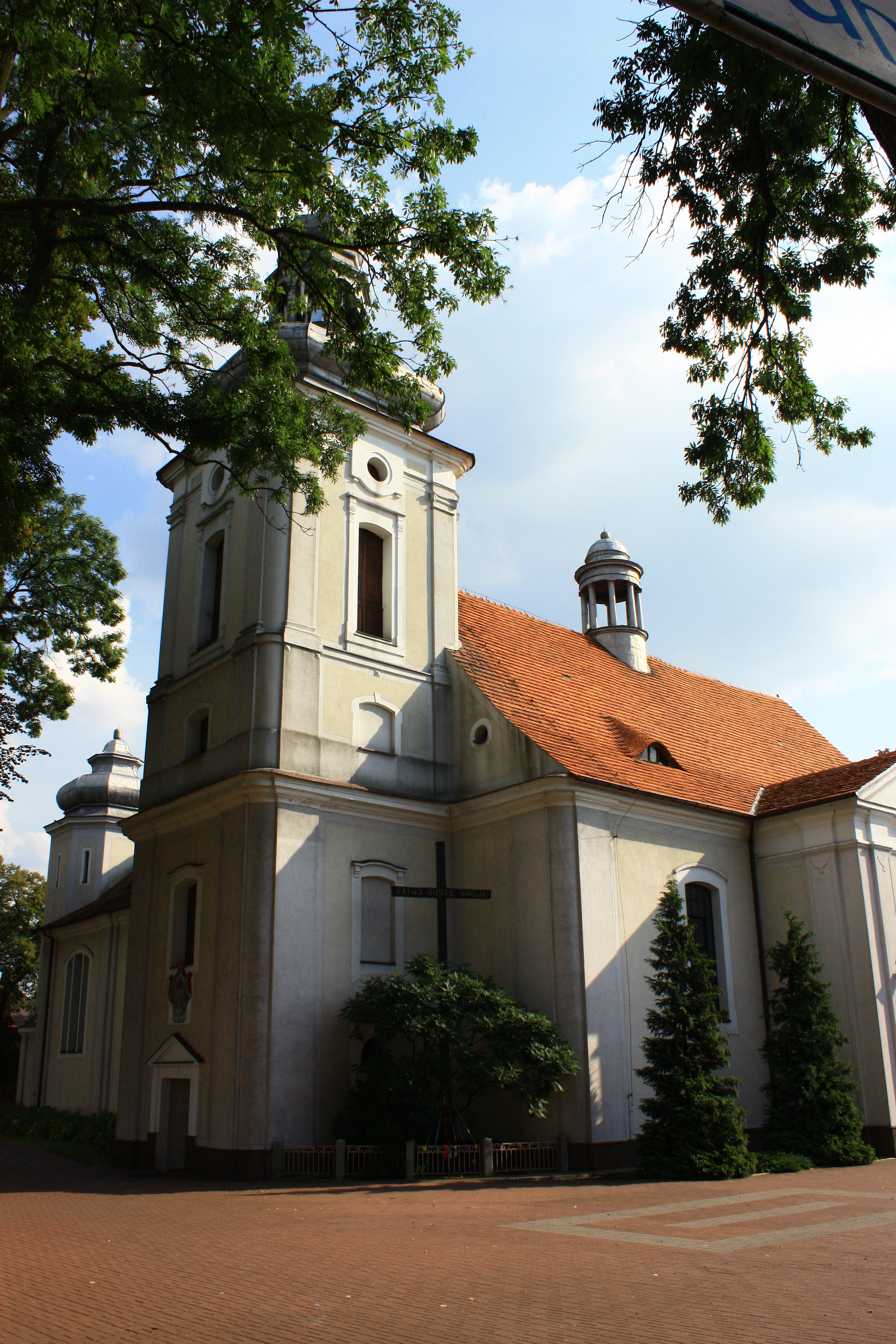 Odolanów, kościół par. p.w. św. Marcina, 1794-1776, 1912-1913